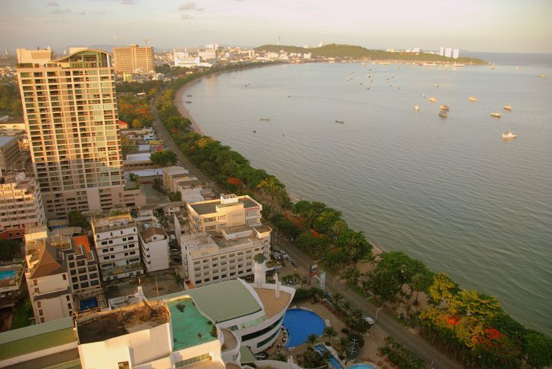 Pattaya, Thailand